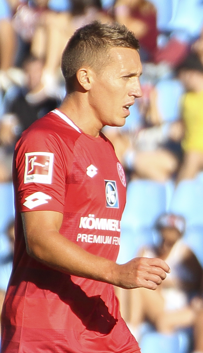 Presentación RC Celta - Temporada 18/19